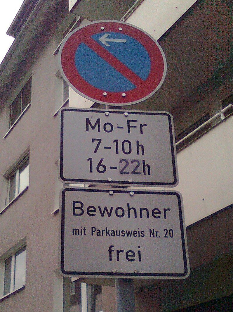 Eingeschränktes Haltverbotschild mit zeitlicher Beschränkung und außer Kraftsetzung durch Zusatzschild.